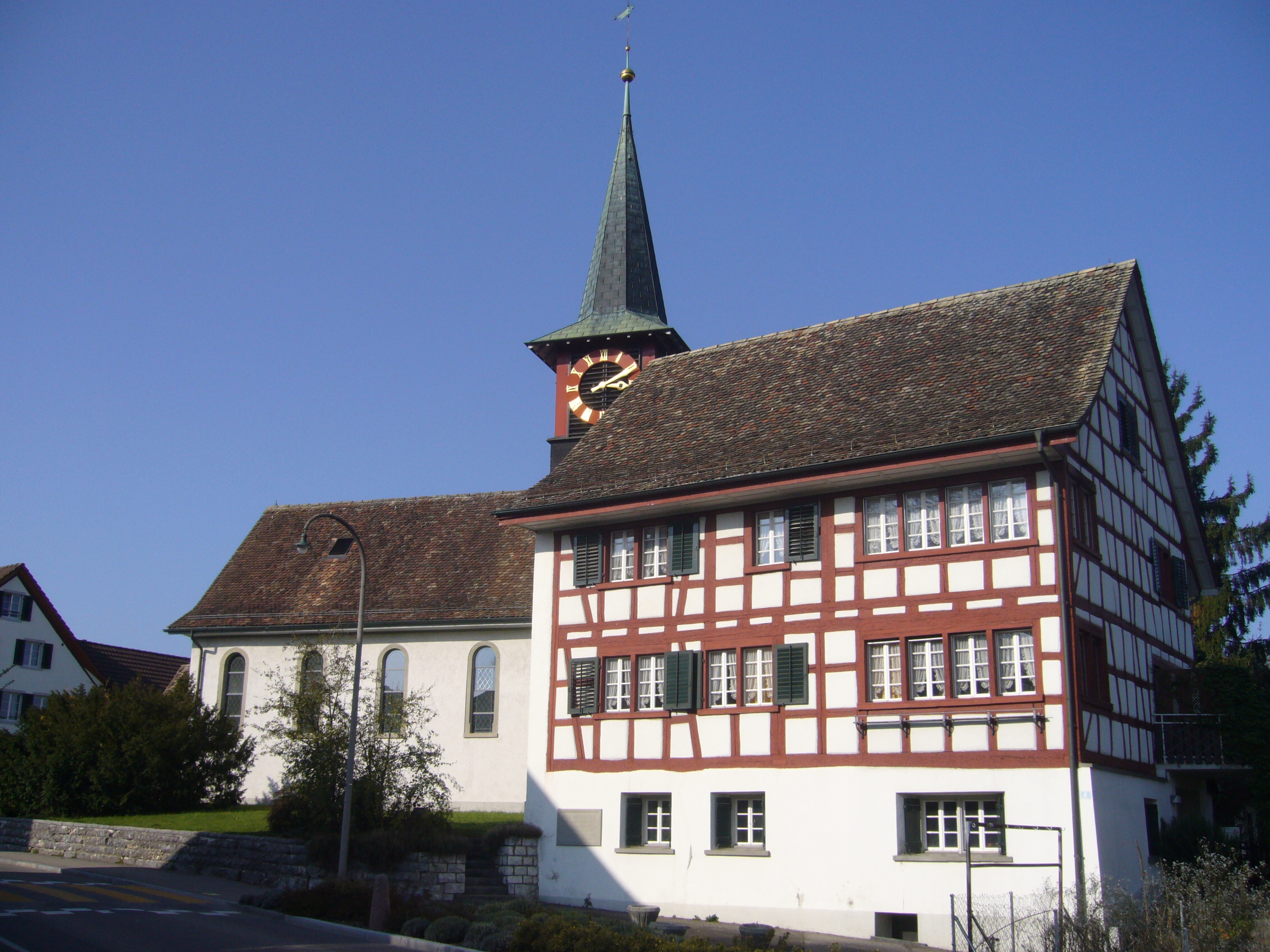 Reformirte Kirche und Wohnhäuser im Dorfkern von Dietlikon.